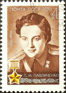 Почтовая марка СССР - Павличенко Людмила Михайловна, Герой Советского Союза